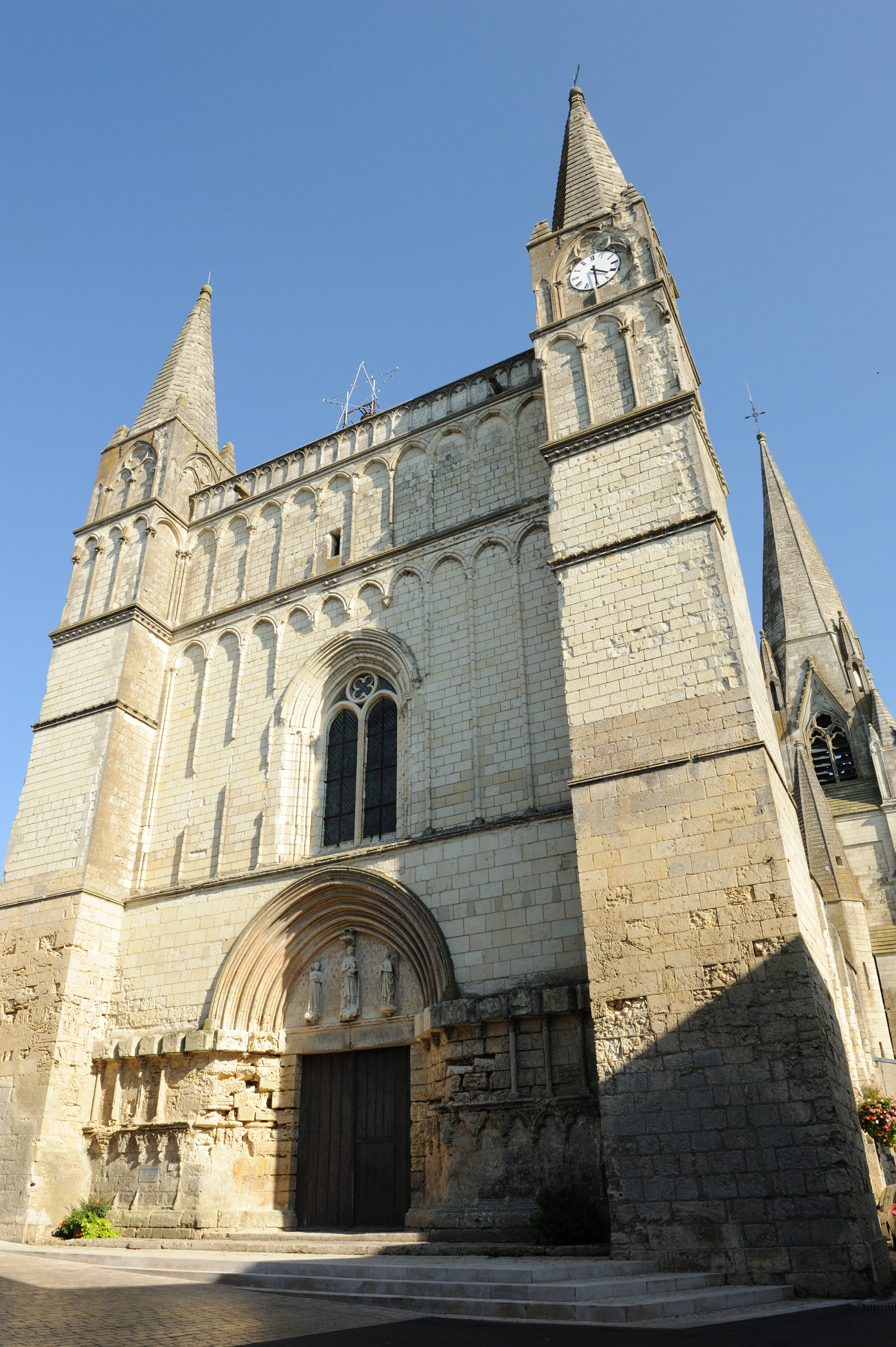 Gothique Plantagenêt .